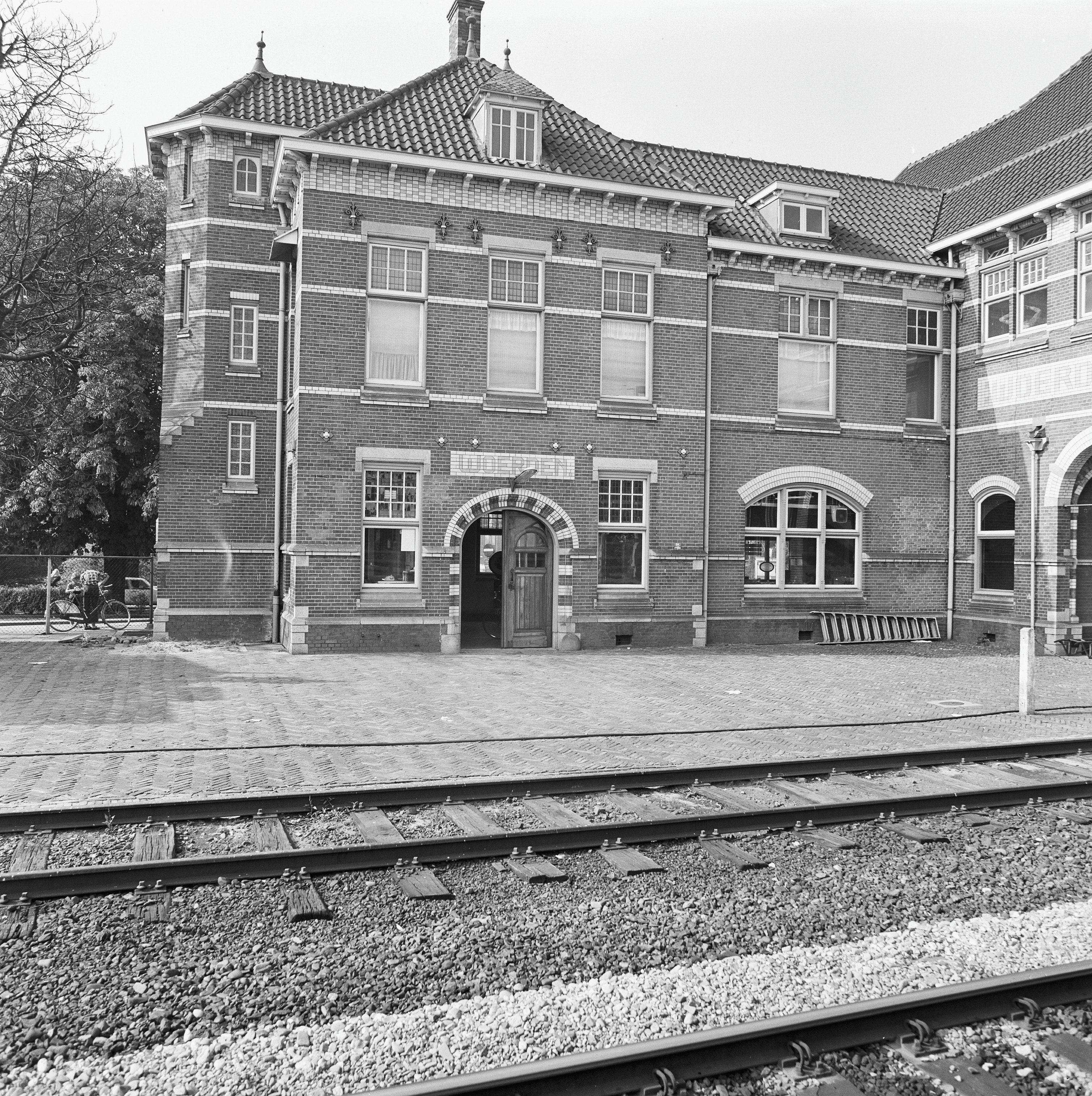 Station N.S.: rechter gedeelte achtergevel